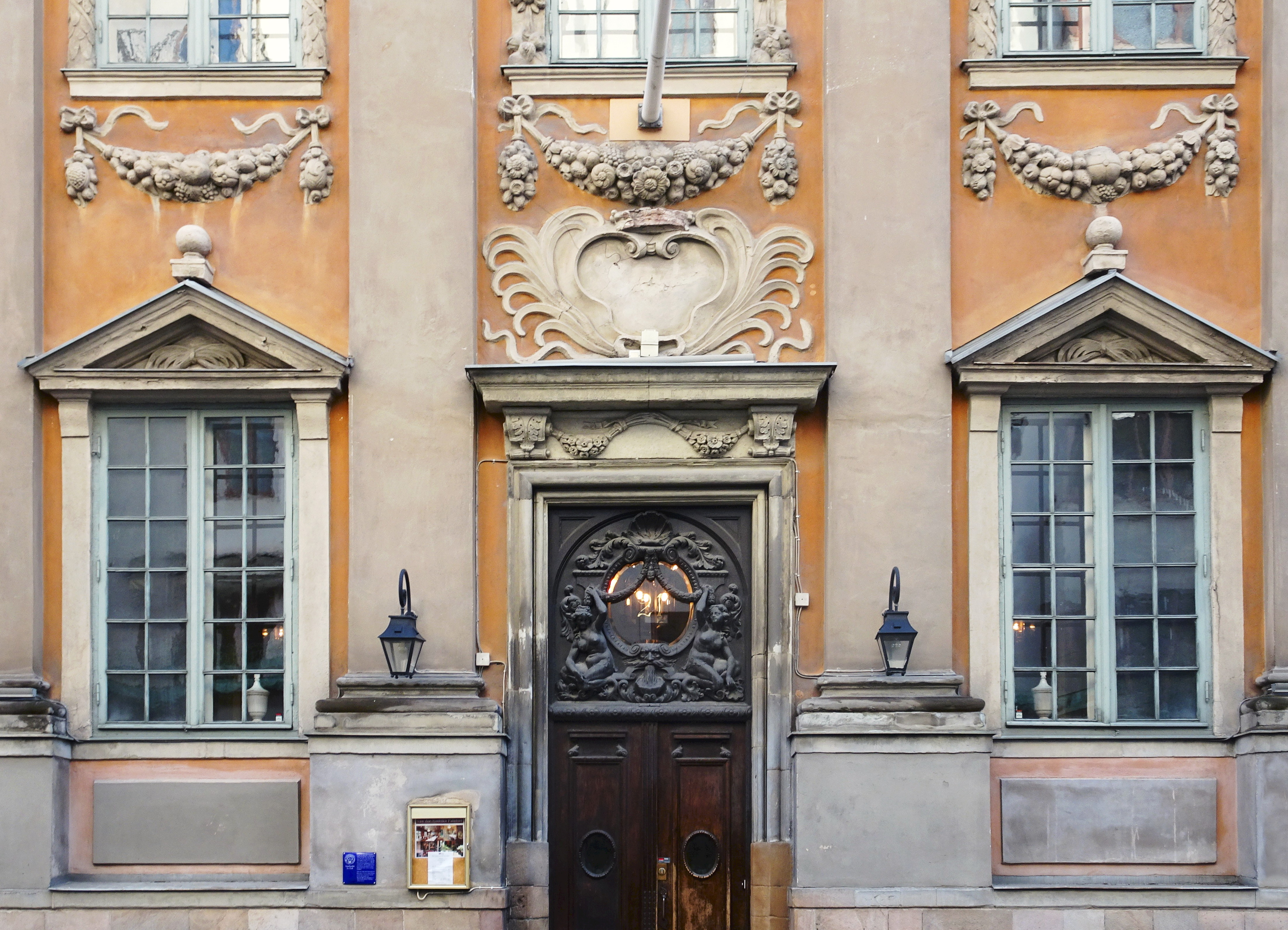 Van der Nootska palatset, fasaddetaljer